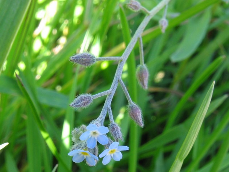 Acker-Vergissmeinnicht, Myosotis arvensis, Kristian Peters 6.7.2004, Warnow-Wiesen